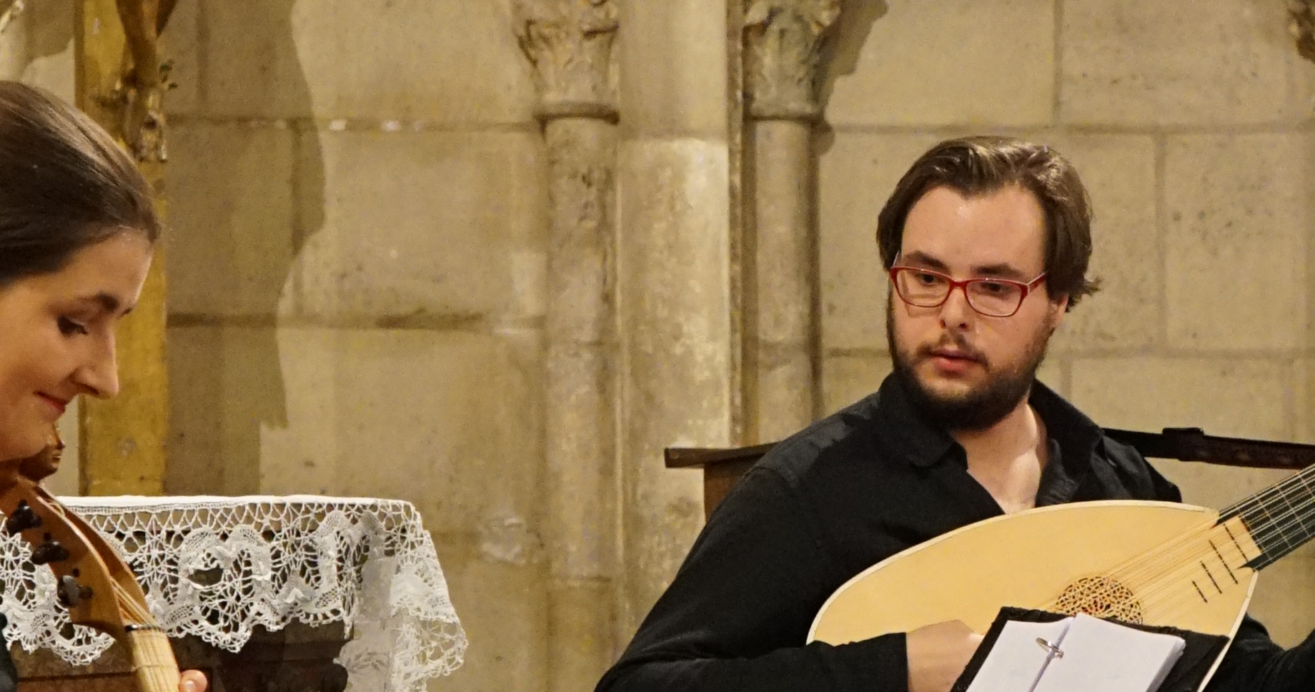 lors des "rencontres baroques rémoise" de 2015, concert Follias para cantar...y danzar .